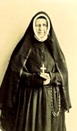 Porträt der Generaloberin Auguste von Sartorius